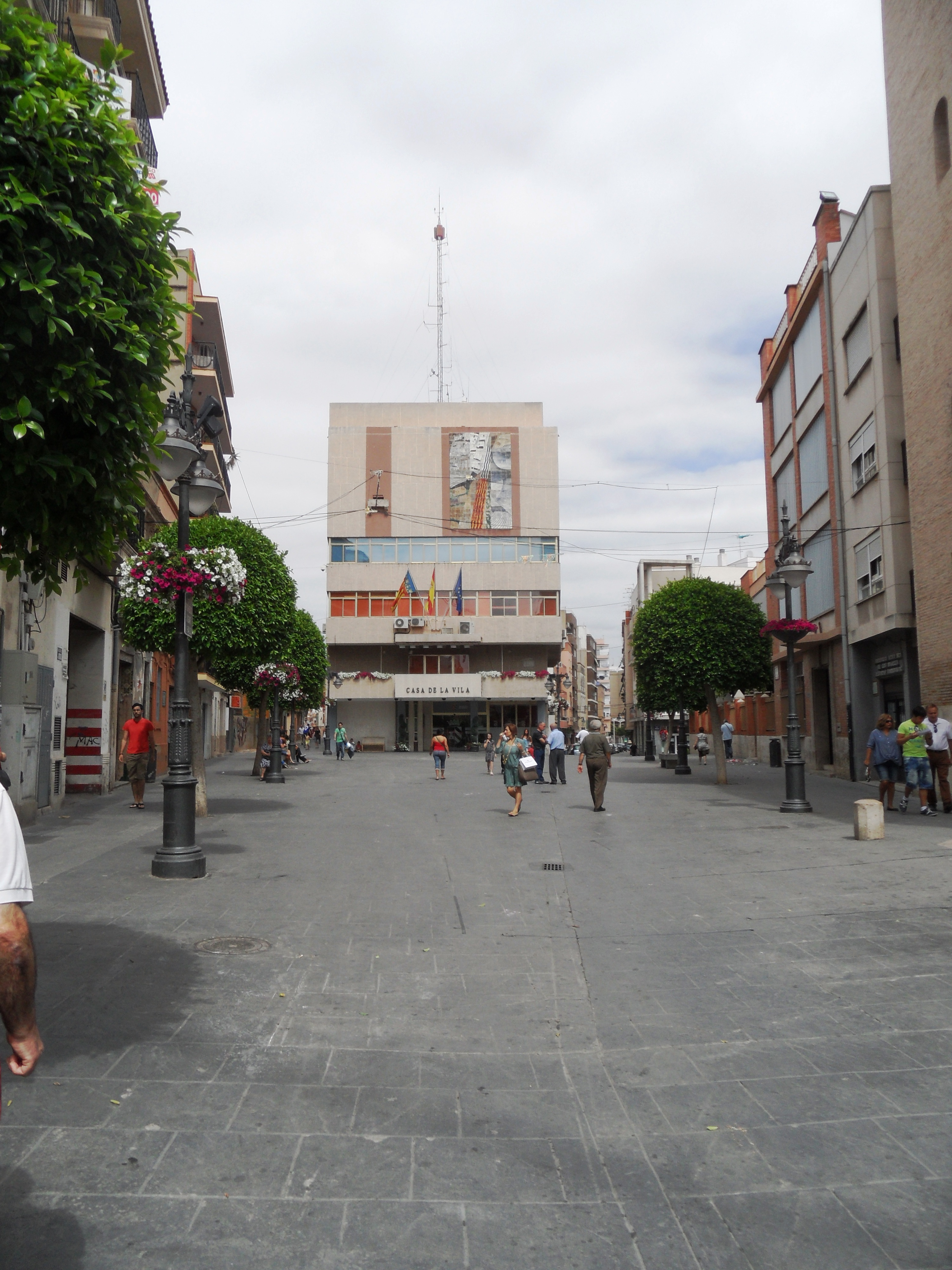 Plaça de la Constitució de Mislata. Al fons, l'ajuntament, on s'alçava la Casa Gran dels barons.